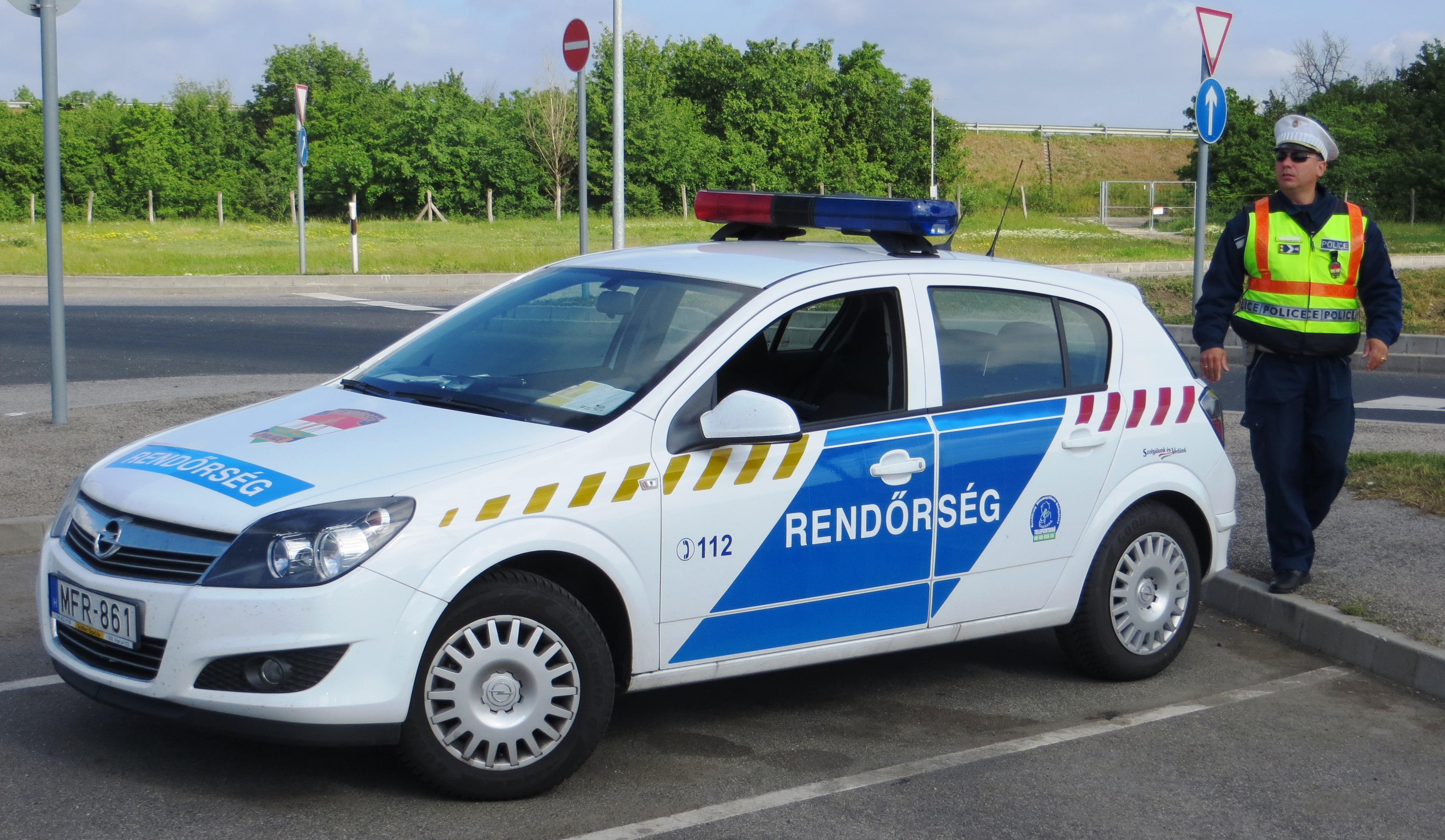 Hongaarse politie auto